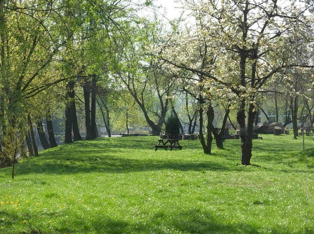 Tereny spacerowo-wypoczynkowe Wyższej Szkoły Gospodarki w Bydgoszczy